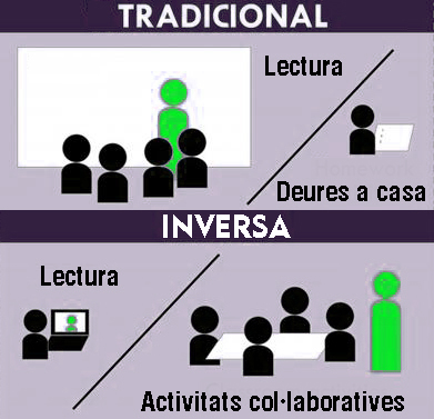 Foto comparativa